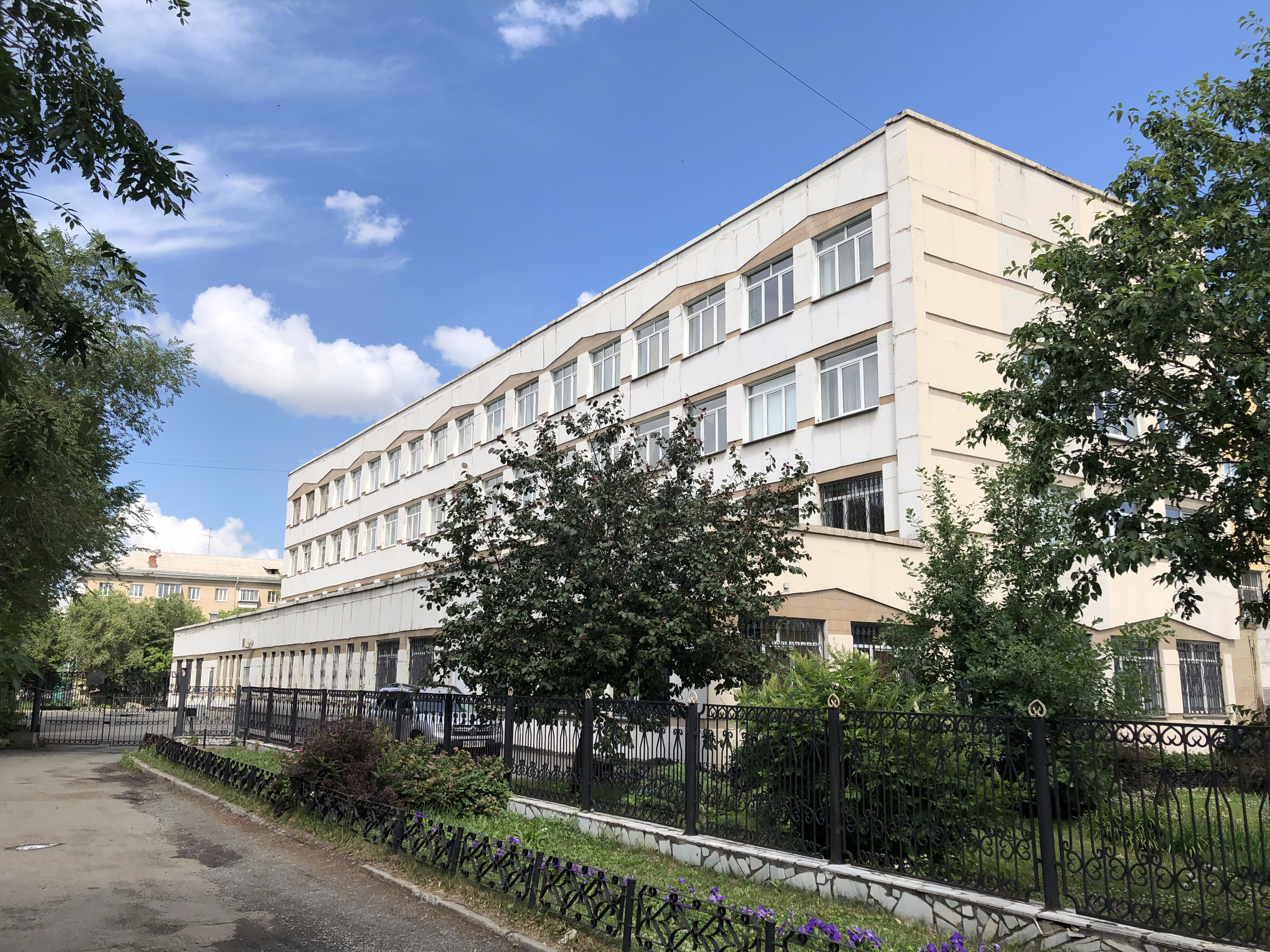 Корпус Б 11 лицея